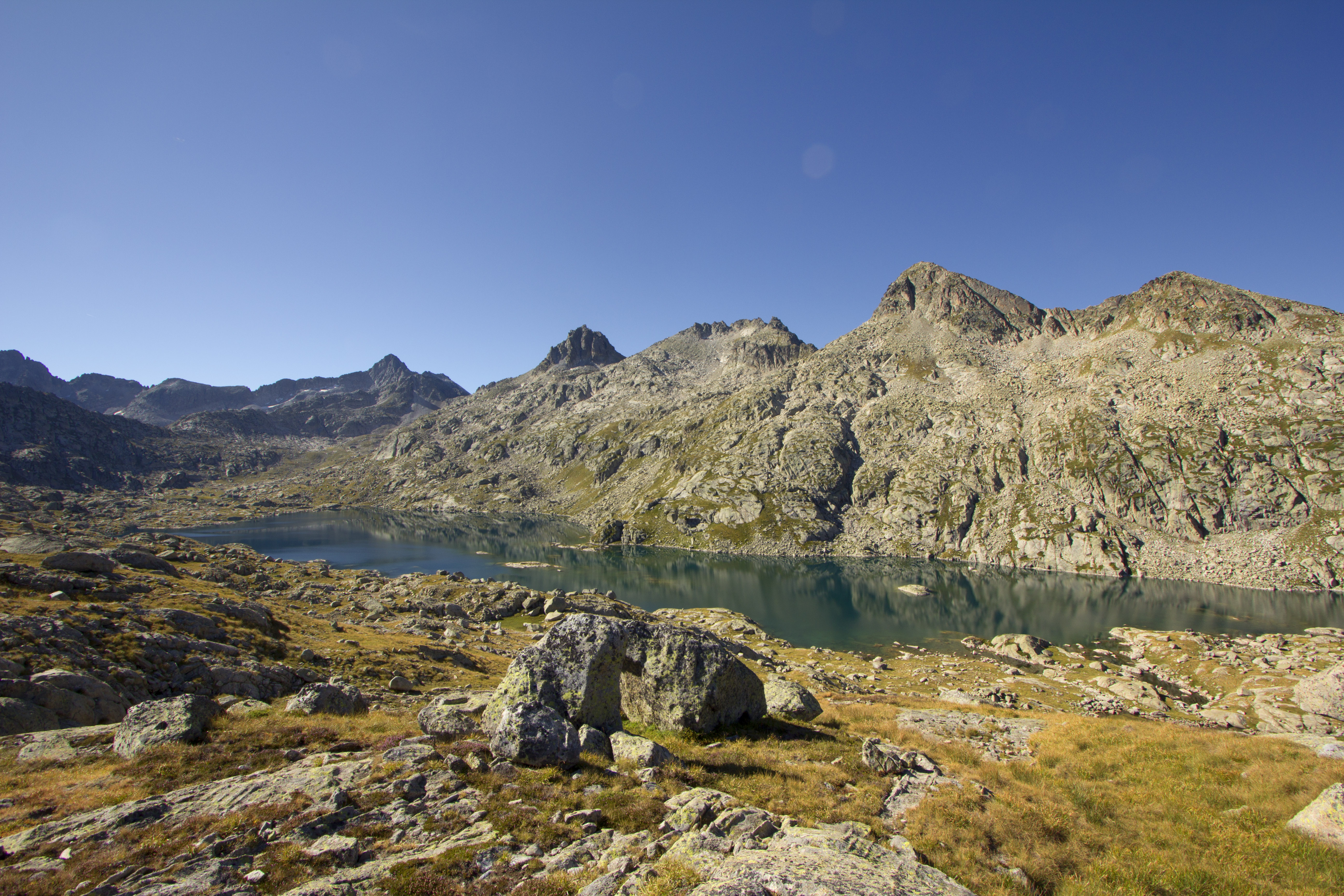 Circ de Tòrt. Des de l'esquerra, Tuc de Tòrt, Tuc de Conangles, Tuc des Estanhets, Tuc dera Canau de Rius i Besiberri Nord. Vall d'Aran.